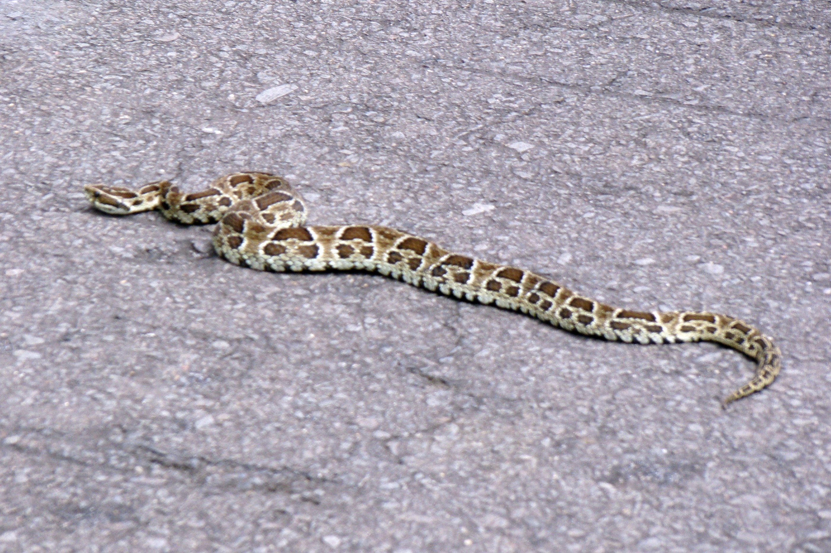 Bothrops jararacussu Moradora do Morro da Igreja, Urubici-SC